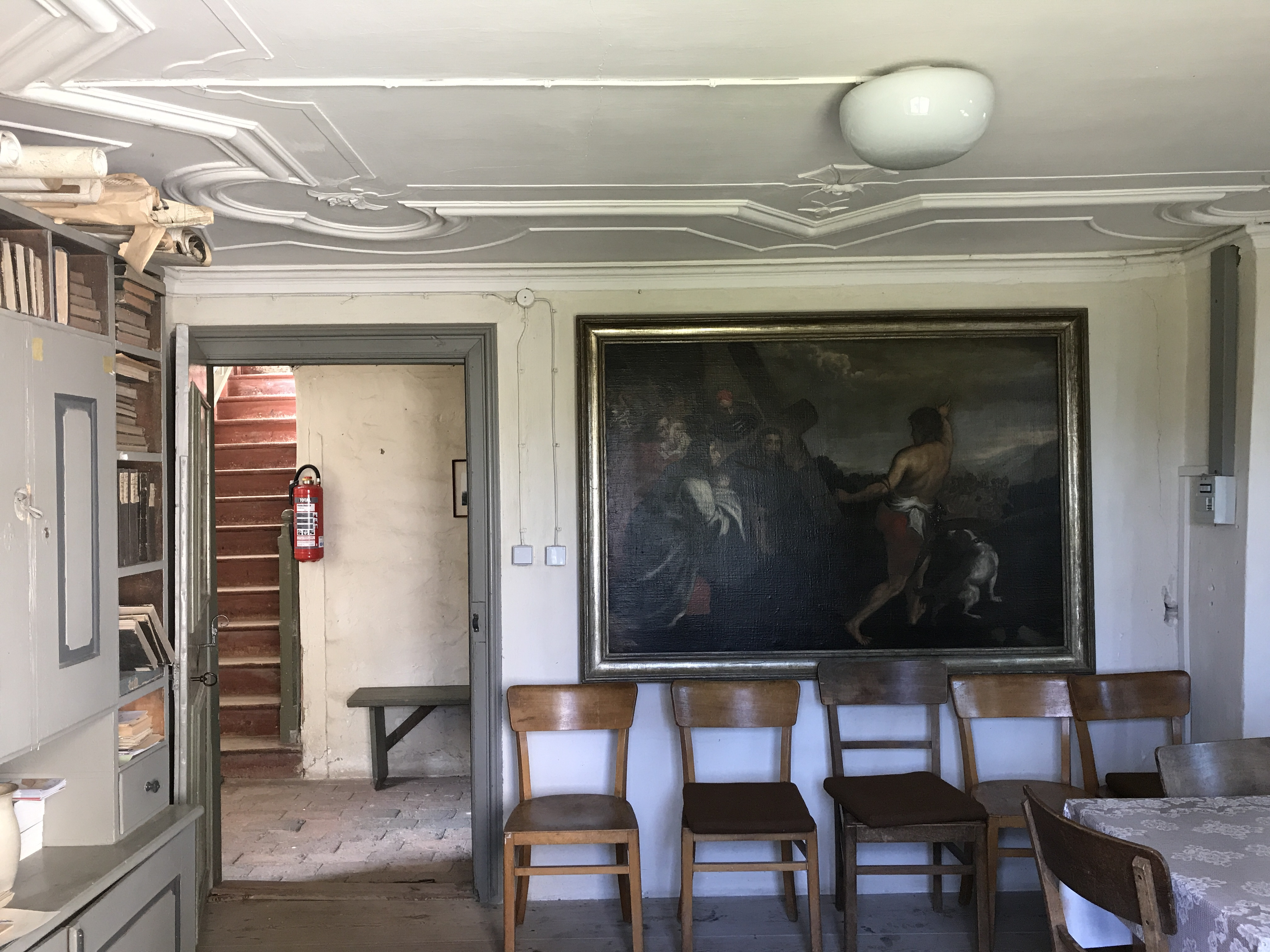 Die Feldsteinkirche Groß Jehser entstand vermutlich im 15. Jahrhundert und steht in Calau im Landkreis Oberspreewald-Lausitz in Brandenburg.